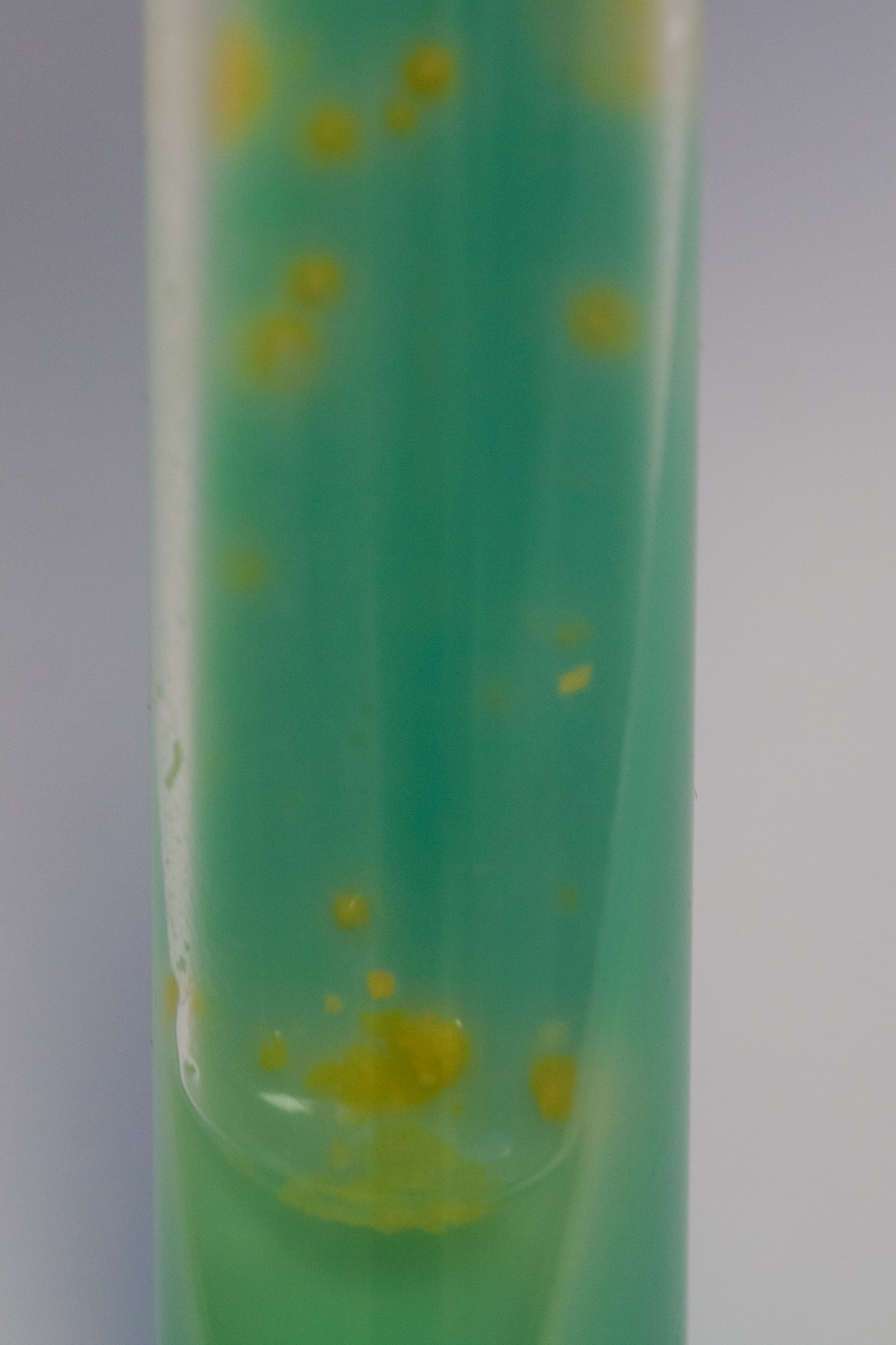 Mycobacterium kansasii growing on Lowenstein–Jensen (LJ) medium